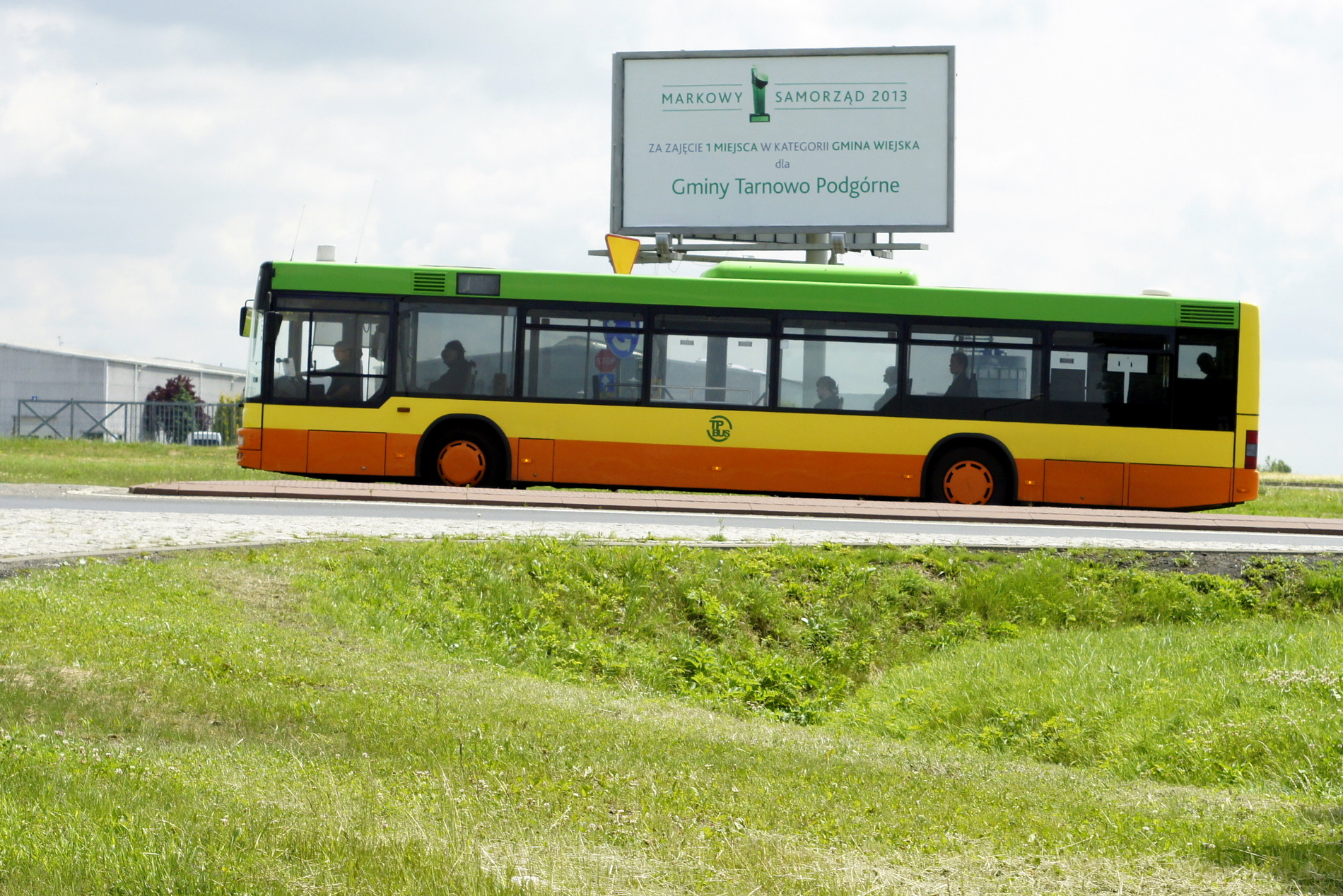 Tarnowo Podgórne. Komunikację w gminie zapewnia firma "TPBUS" spółka z ograniczoną odpowiedzialnością która działa od 1 stycznia 1999 roku. 100% udziałów w spółce należy do gminy Tarnowo Podgórne. Firma zapewnia autobusowe połączenie gmin Tarnowo Podgórne, Duszniki i Kaźmierz z Poznaniem (pętla "Ogrody").